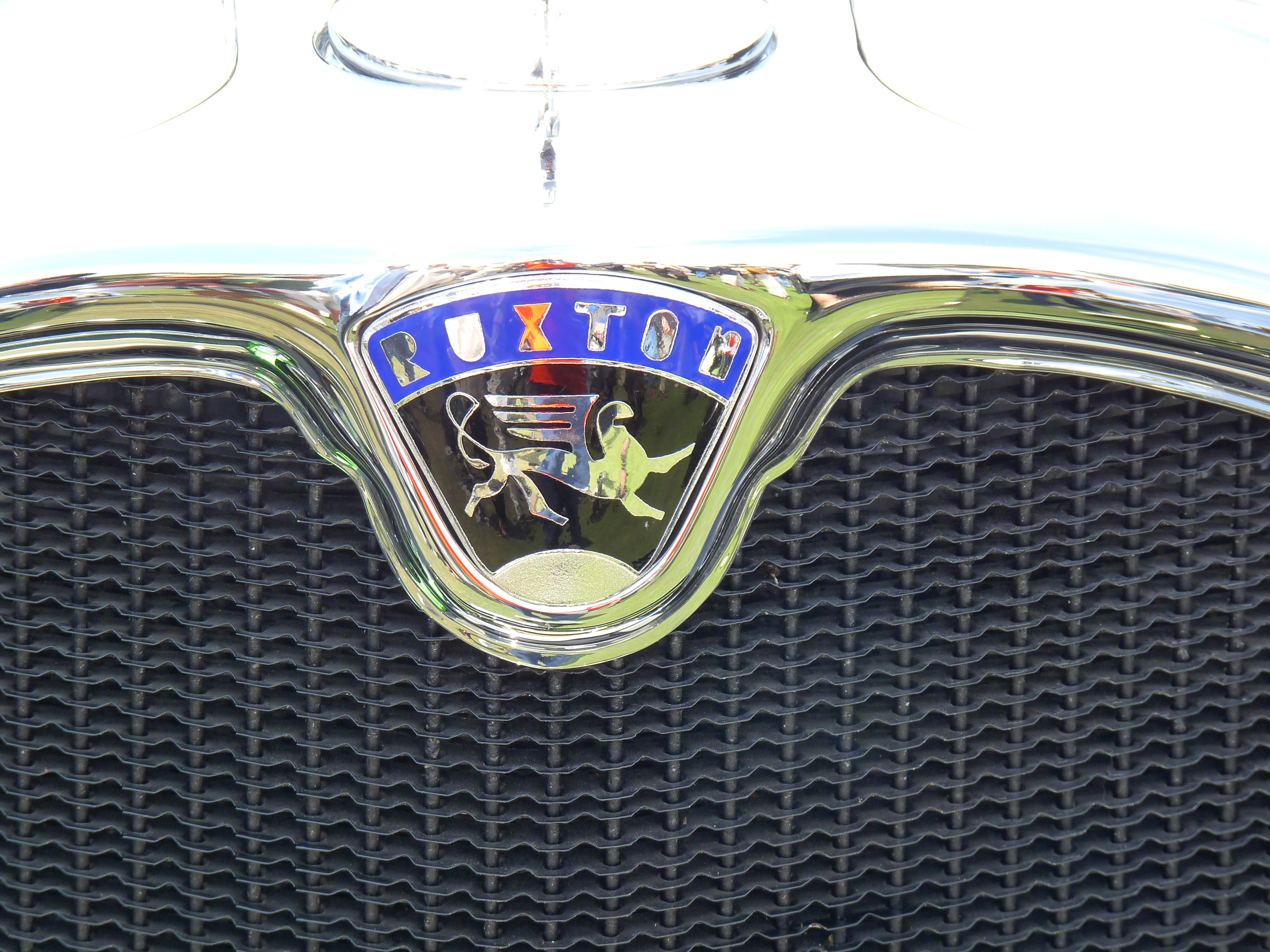 1930 Ruxton Model C Rauch & Lang Phaeton